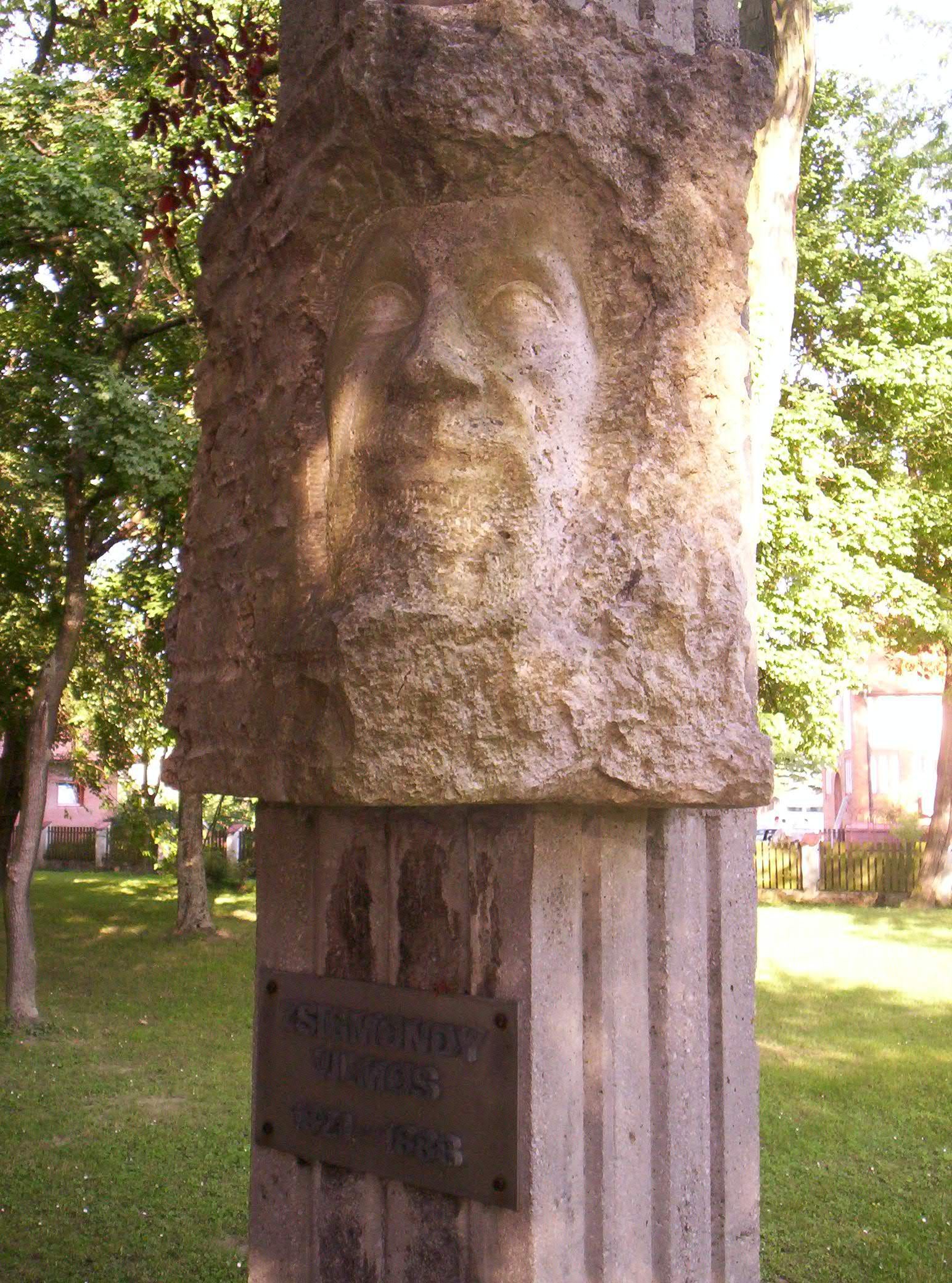 Zsigmondy Vilmos bányamérnök (nevéhez fűződik az első, gyógyvizet felszínre hozó kutak fúrása) szobra Harkányban (Veszprémi Imre alkotása) – photo taken by uploader User:Csanády in 2006.